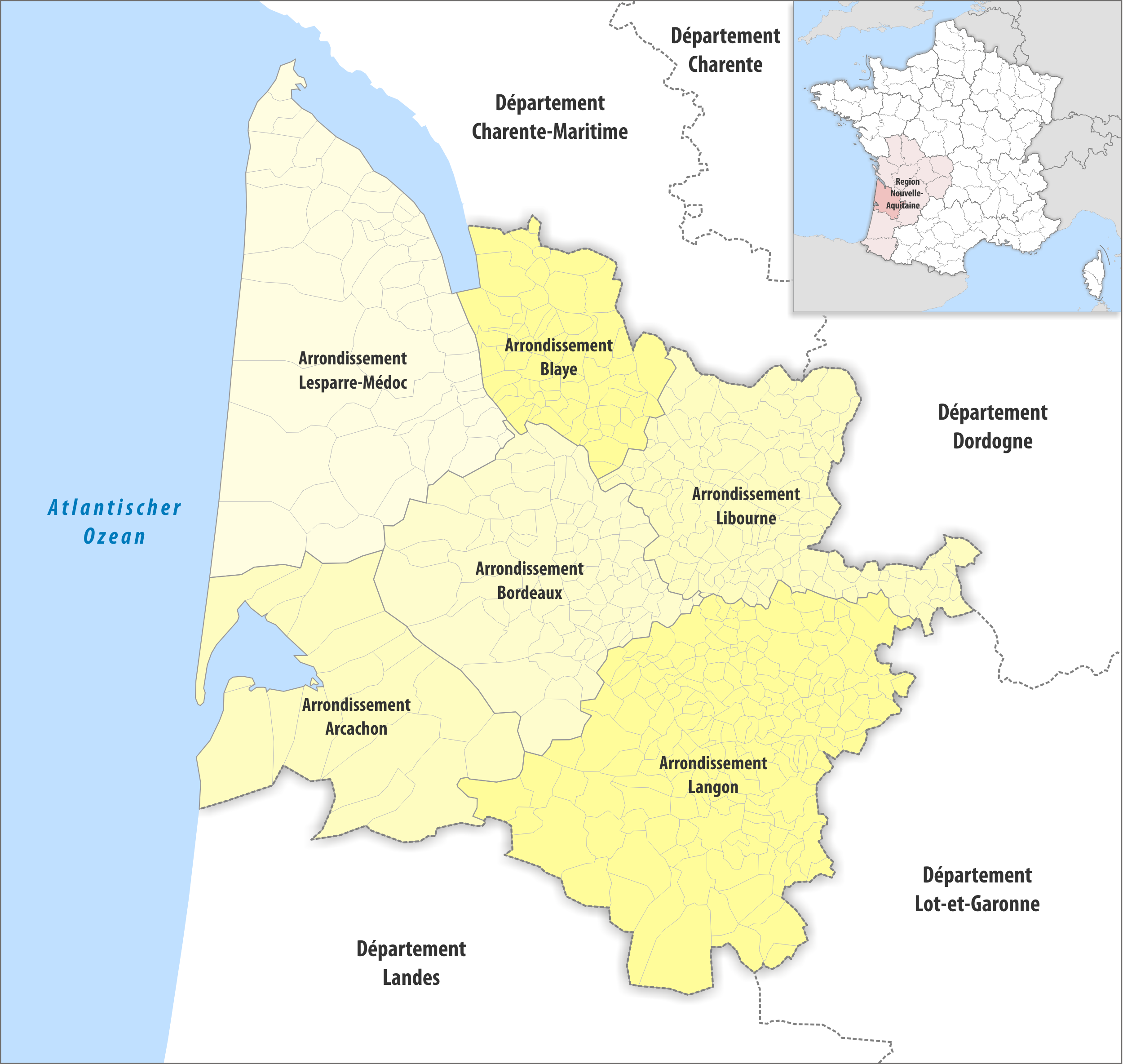 Gemeinden und Arrondissemente im Departement Gironde